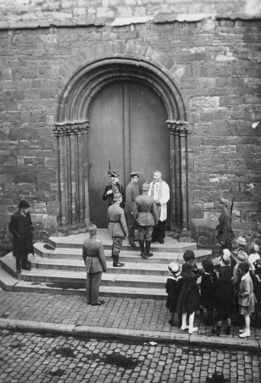 Le doyen refusant aux troupes allemandes l'accès à la collégiale